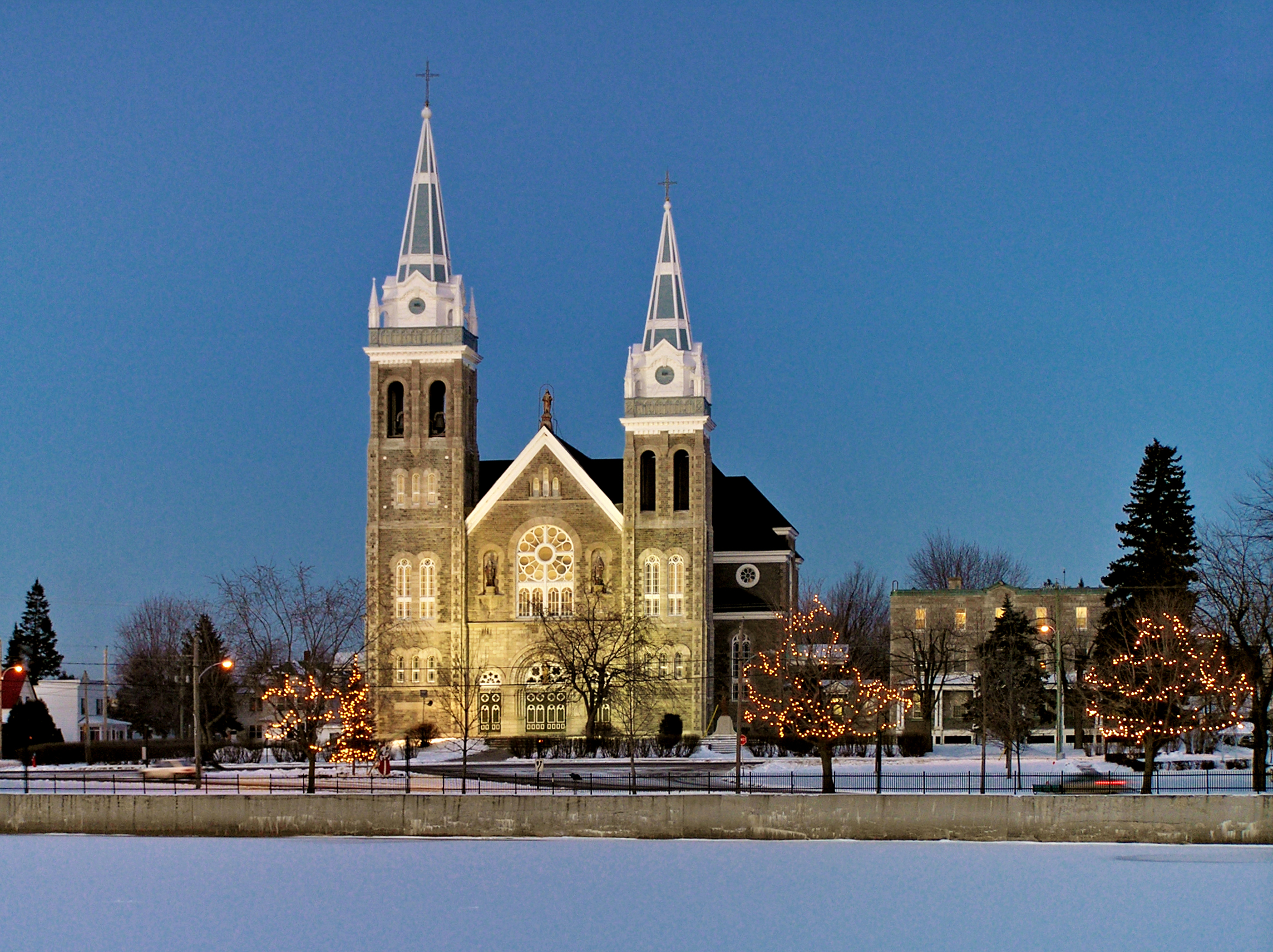 Farnham (Québec) - Église catholique Saint-Romuald (Déc-2005)